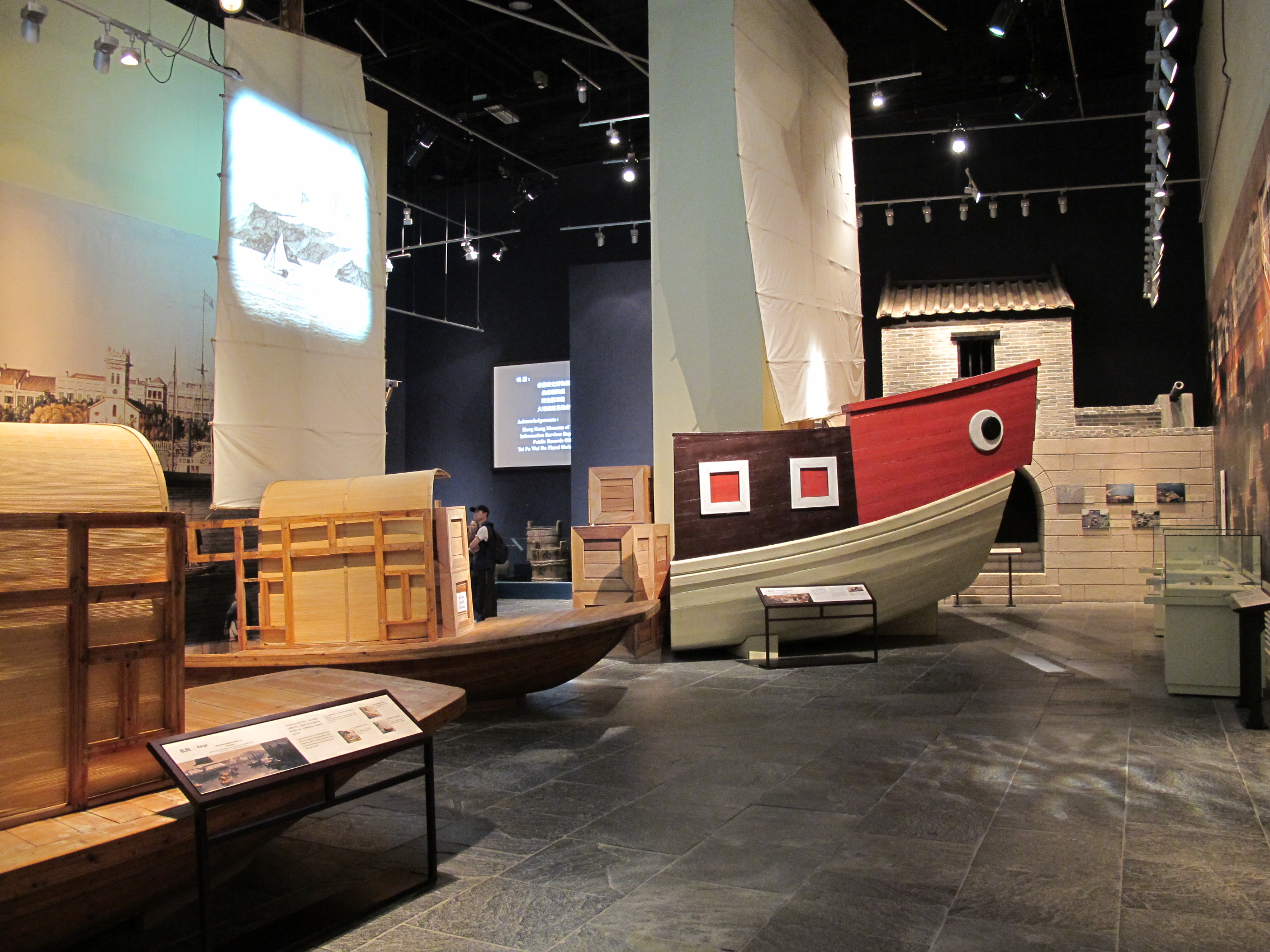 Hong Kong Heritage Museum New Territories Heritage Hall